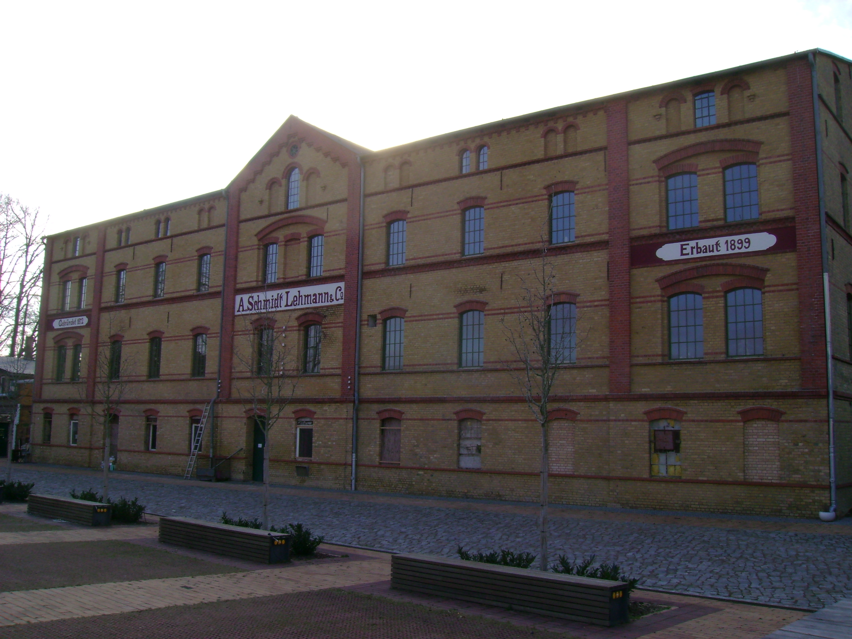 Ofen- und Keramikmuseum in Velten Wilhelmstraße 32